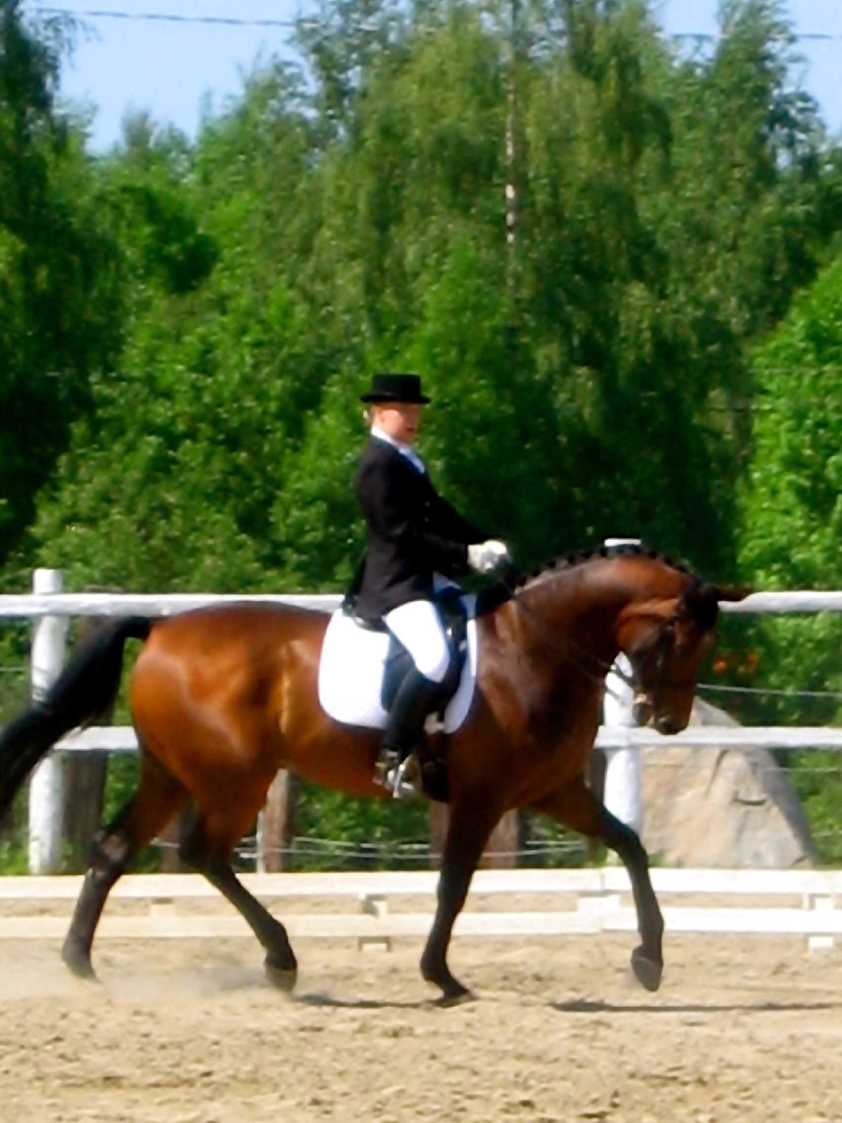 Hennamari Malkavaara & Mr Don Hill